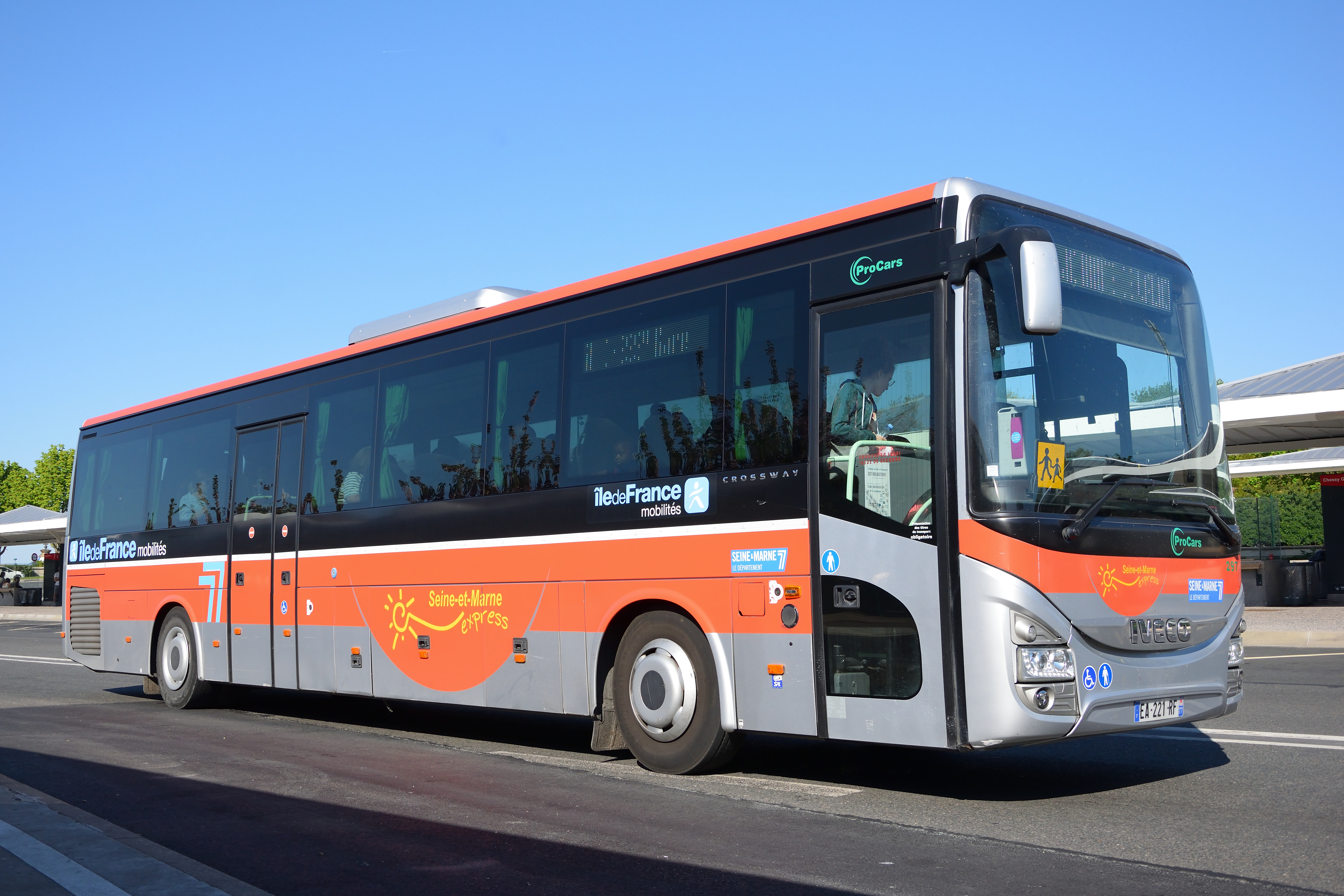 Iveco Crossway Pro de la compagnie Pro Cars n°297 sur la ligne 50 du réseau Seine et Marne Express arrivant à Chessy Marne la Vallée RER.